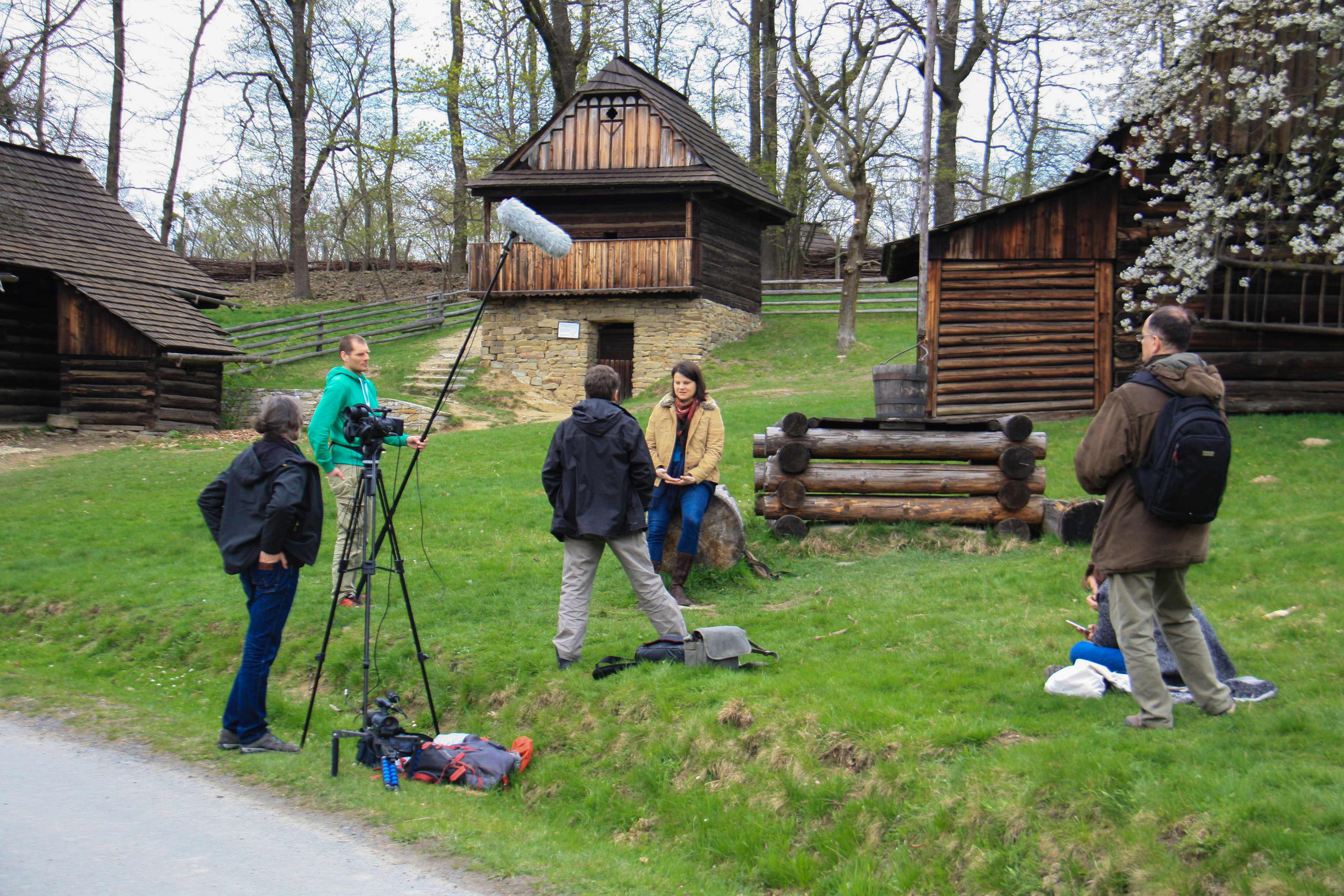 Wywiad z etnografką.